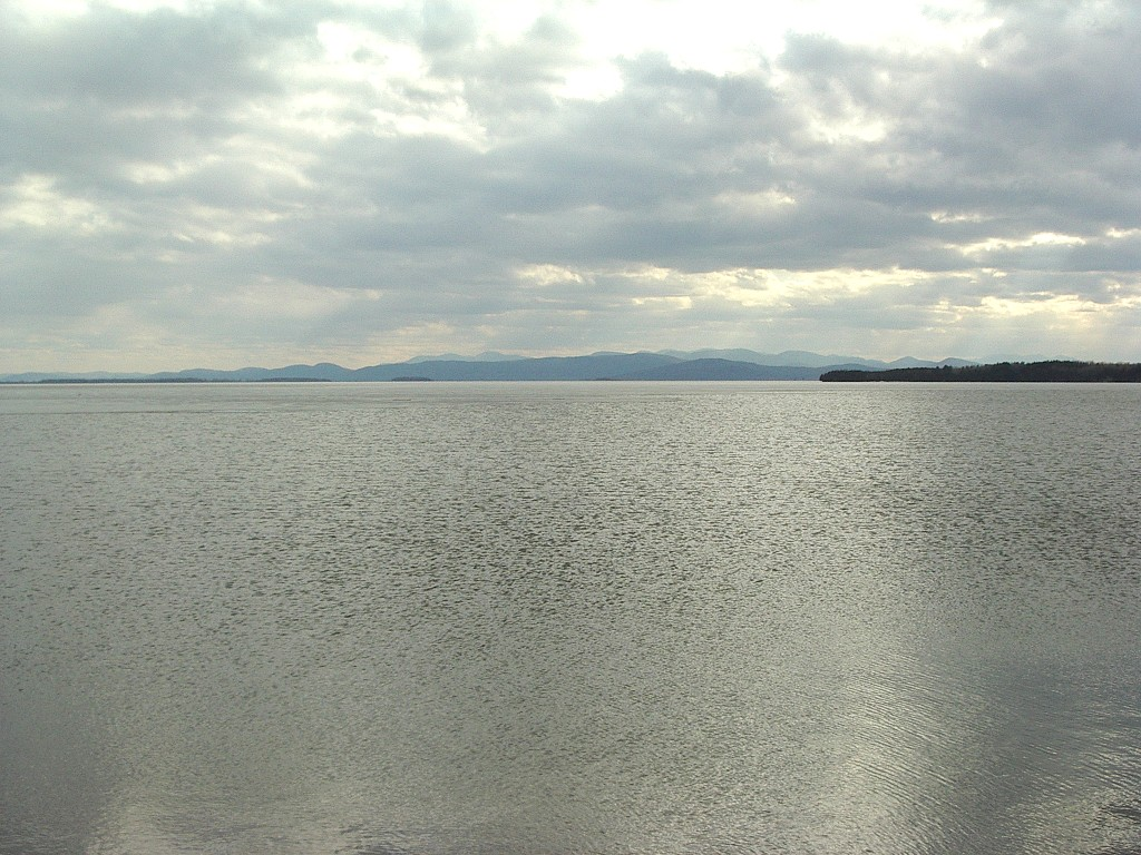 Blick auf den Lake Champlain, Vermont (USA).